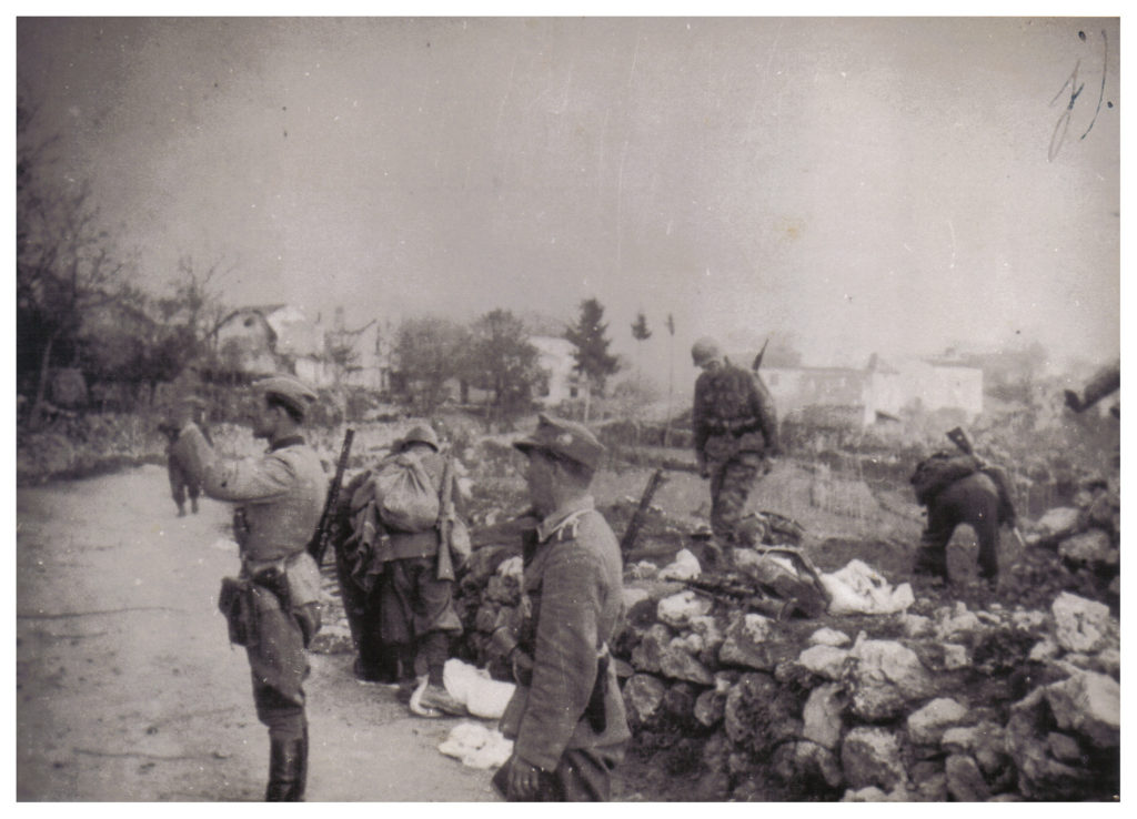 Strage di Lipa